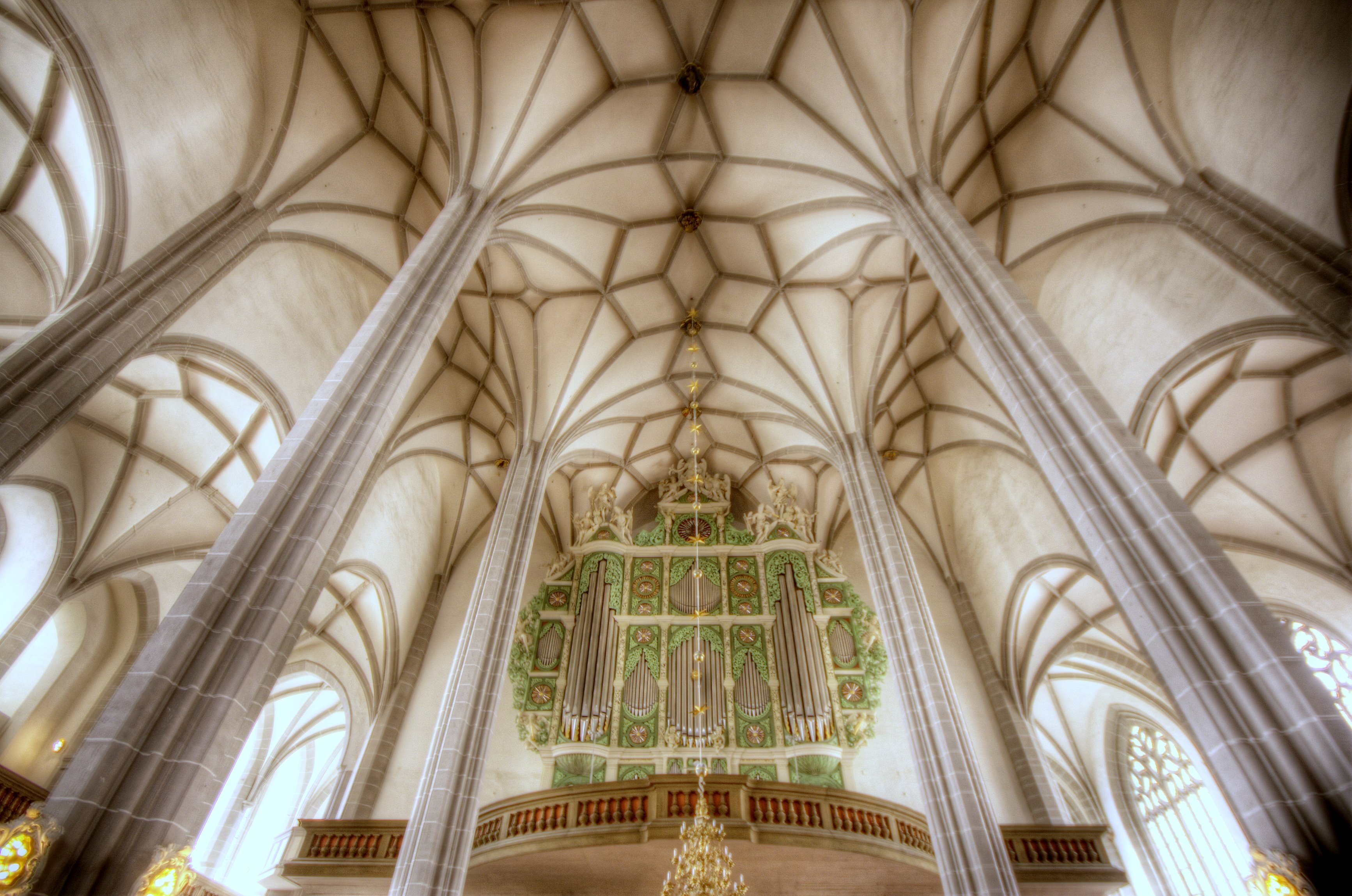 Görlitz, Orgel der Peterskirche